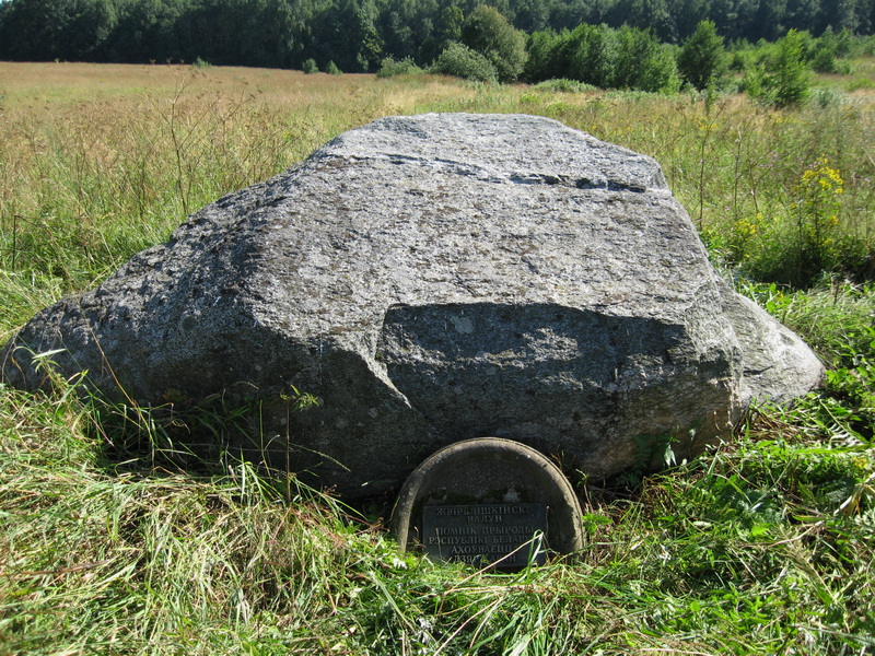 Жвірблішкі. Валун «Жвірблішкінскі»